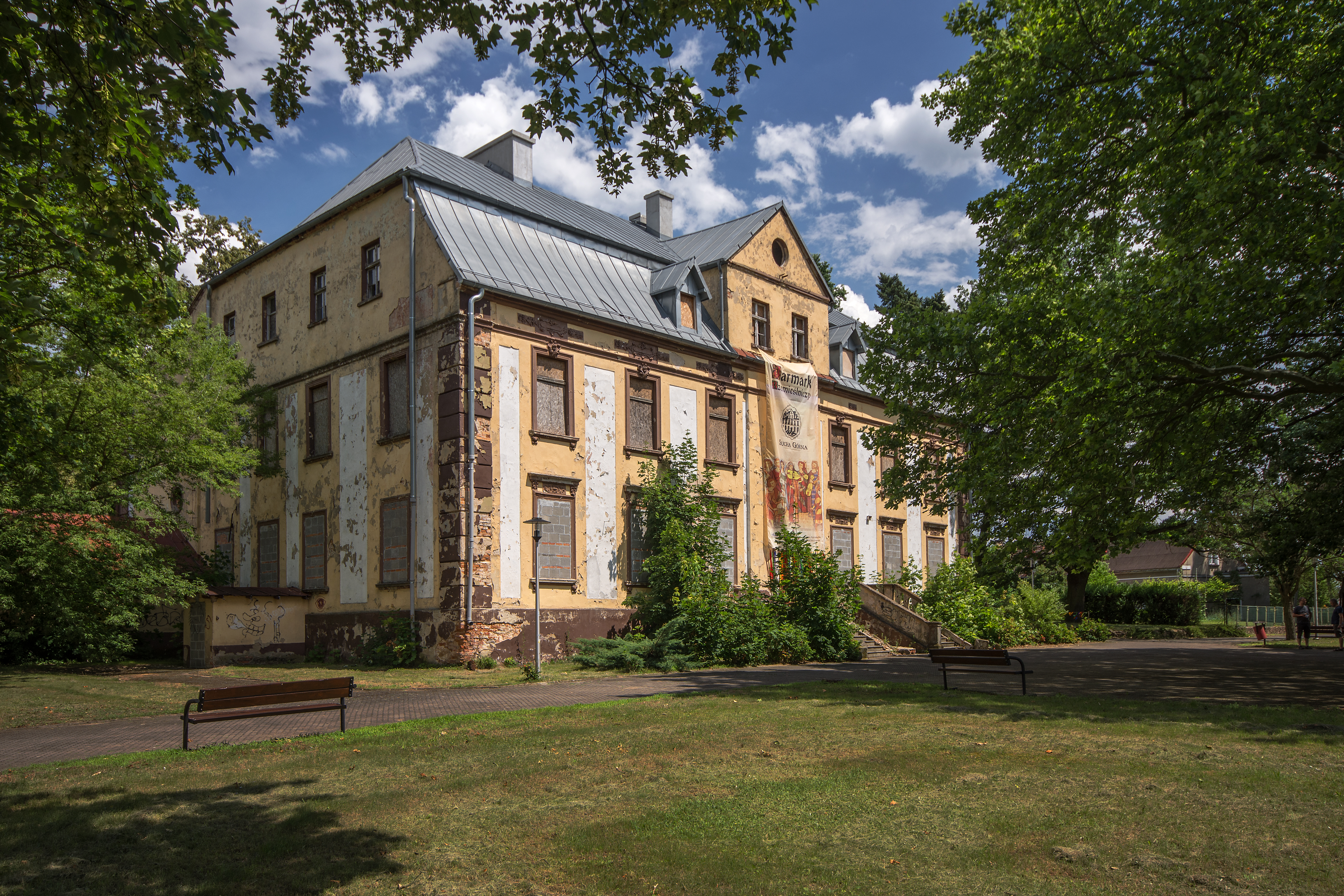 Sucha Górna, pałac (nr 32), XVIII, 1880